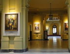 El Salón de los Patriotas del Bicentenario, imagen de la página oficial de la Casa Rosada.